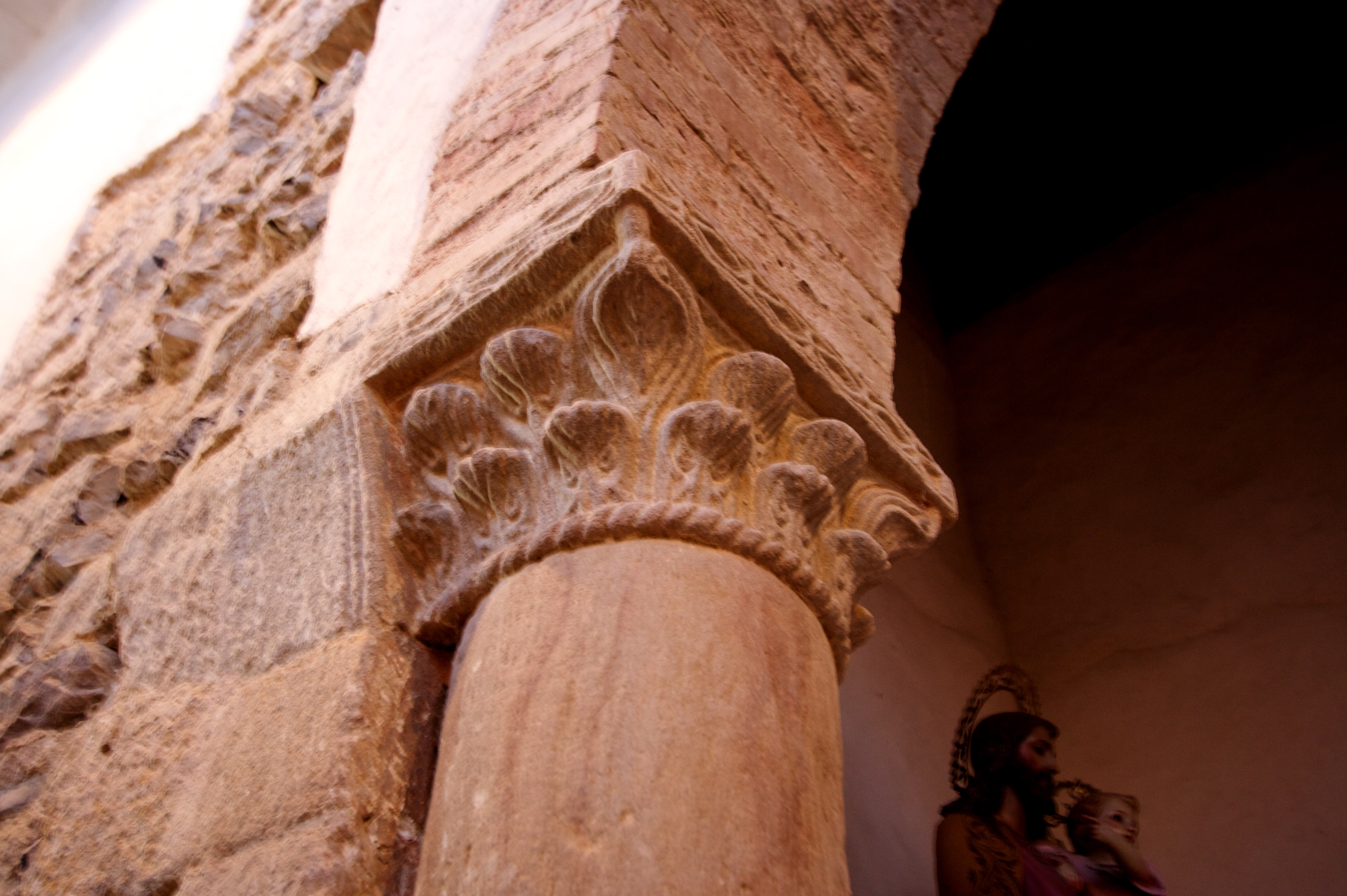 Iglesia prerrománica de Santiago de Gobiendes.